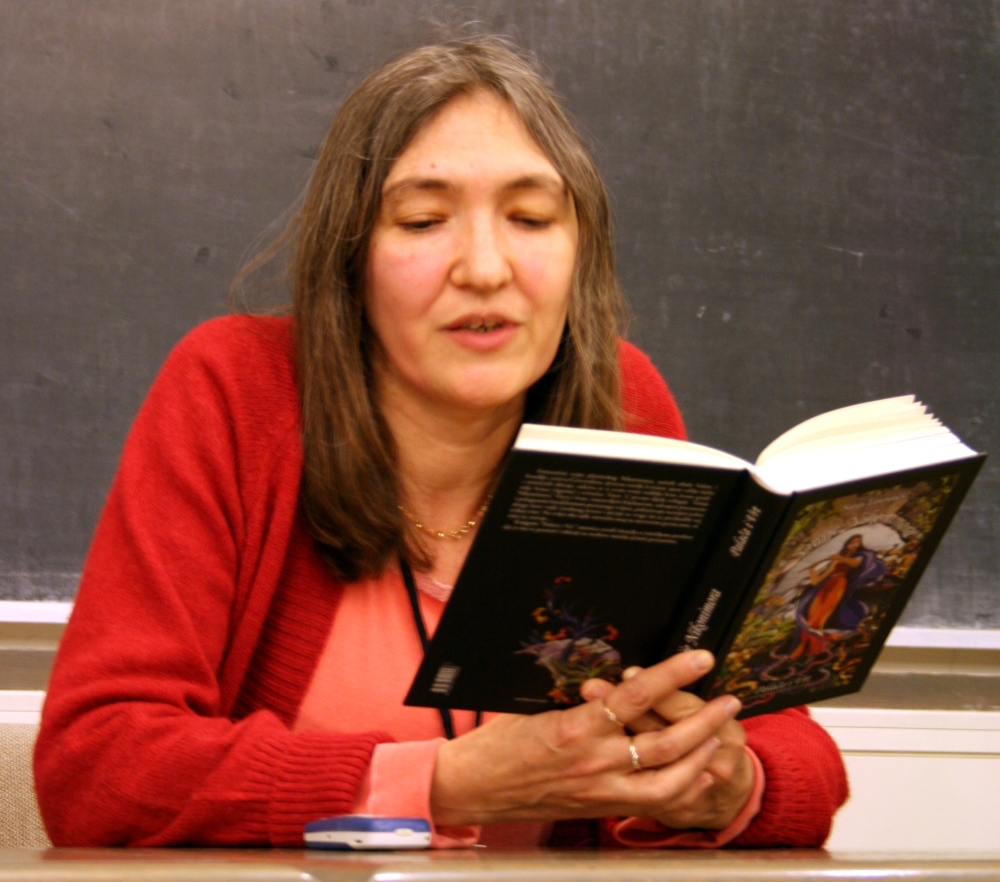 Sanja Lovrenčić na SFeraKonu 2009.